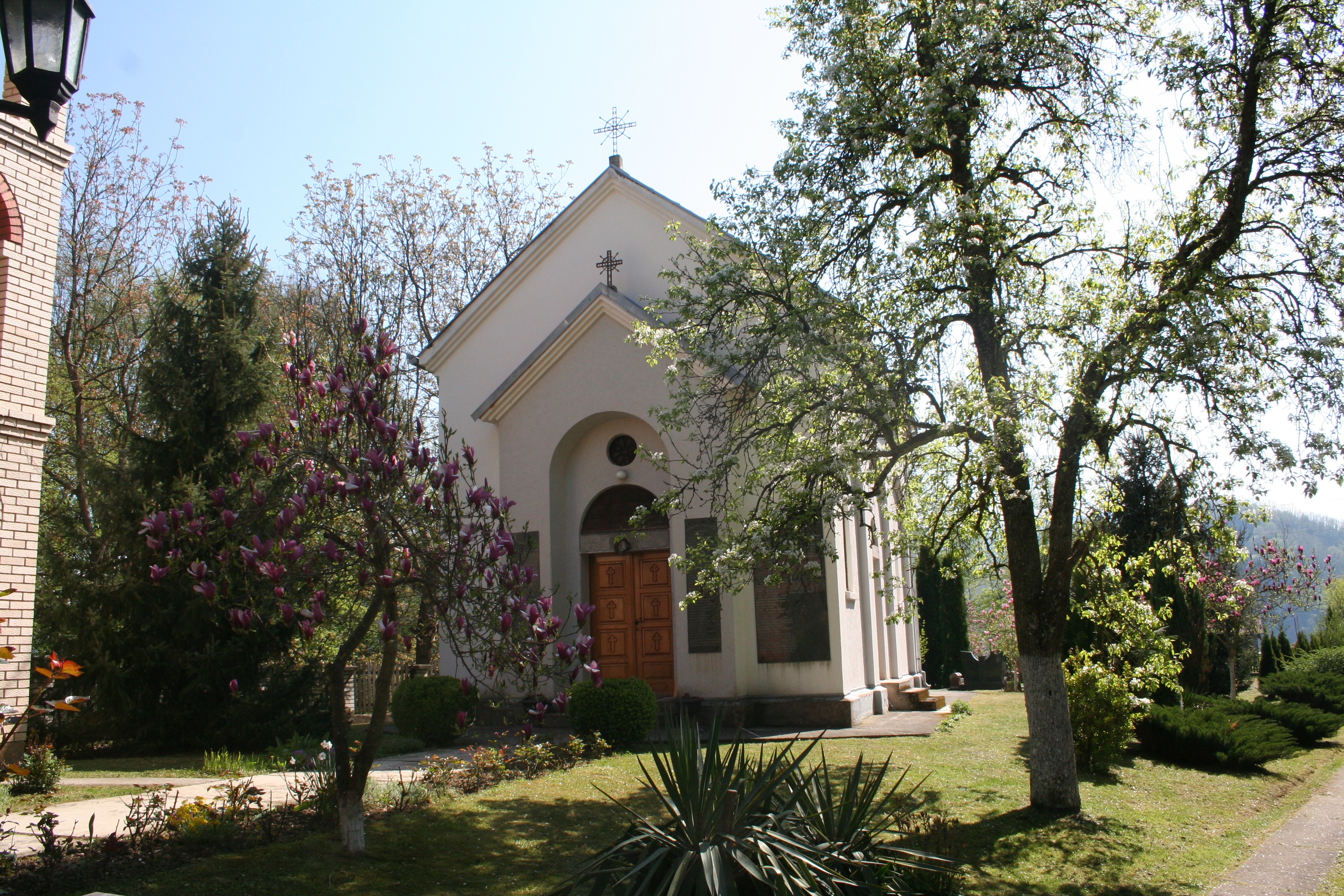 Manastir Čitluk